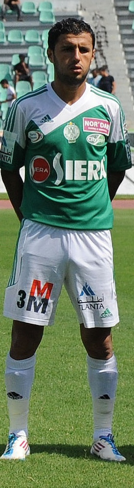 زكرياء هاشيمي